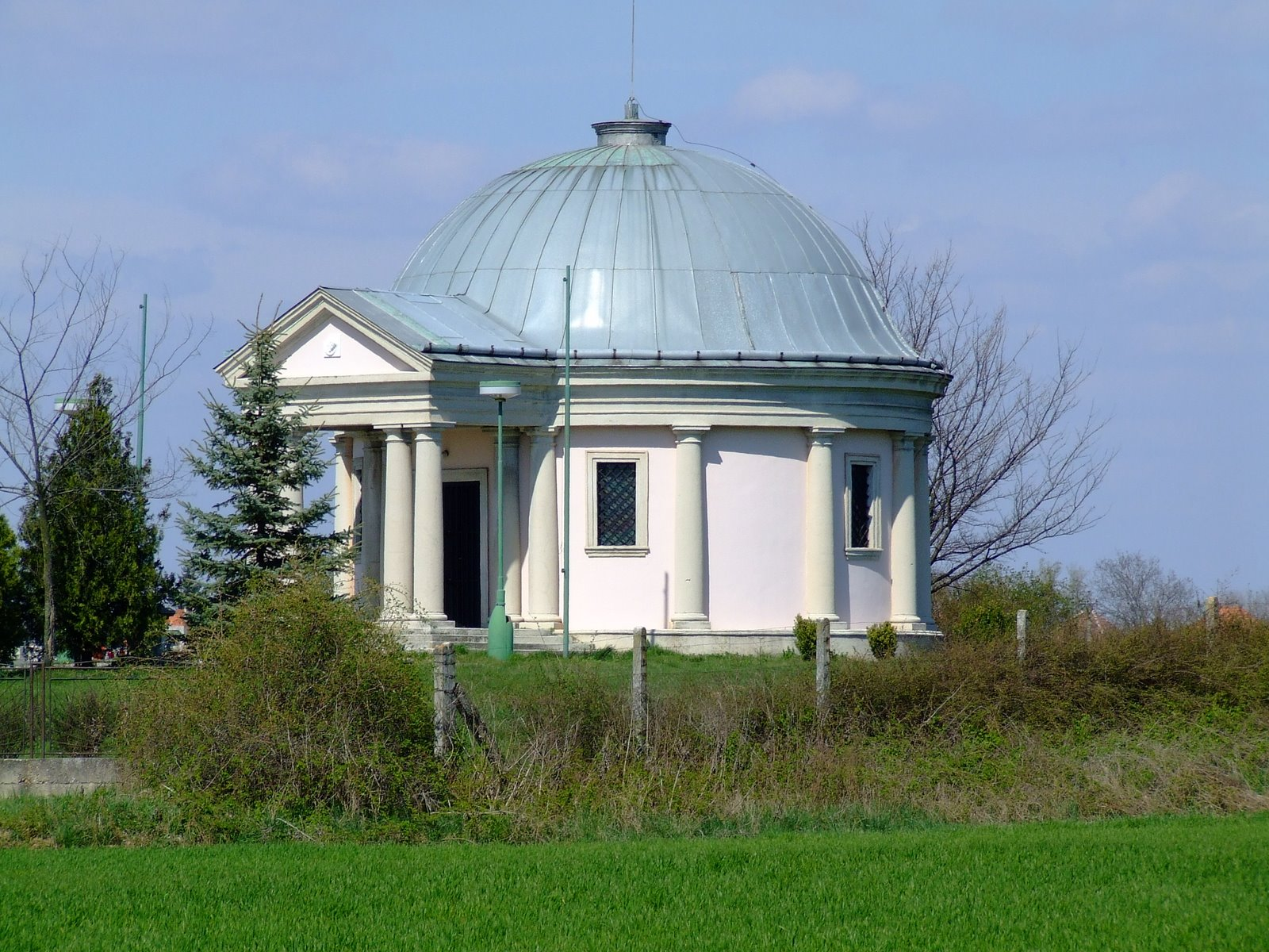 Mauzóleum rod. Szunyoghovcov v Dolných Zeleniciach